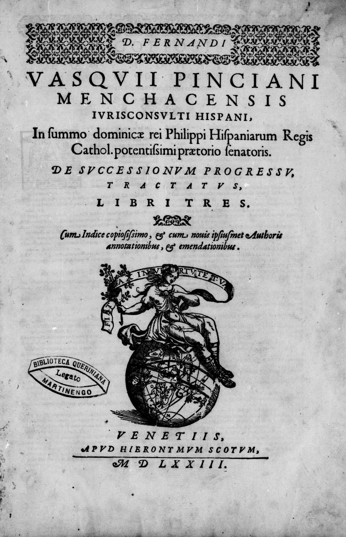 Frontespizio